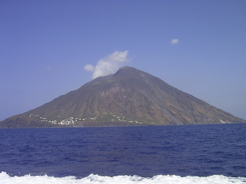 Stromboli